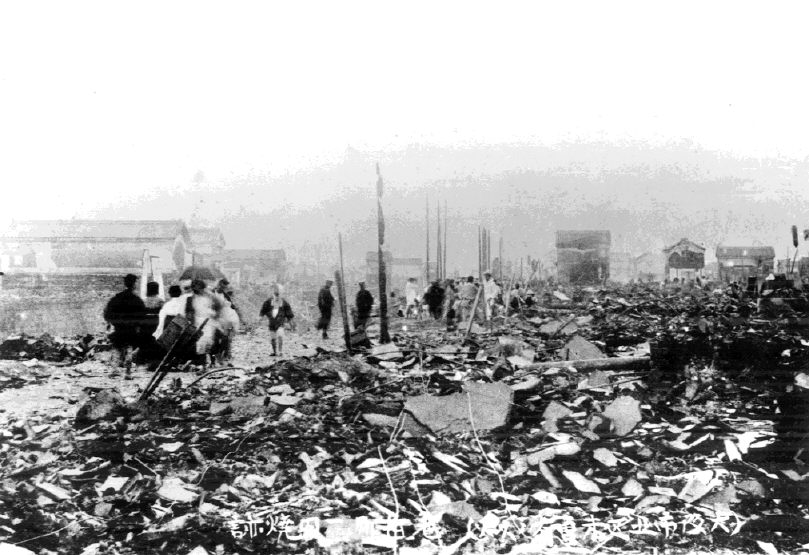 (大阪市北区未曽有ノ大火)老松町（現在の西天満）一円の焼跡